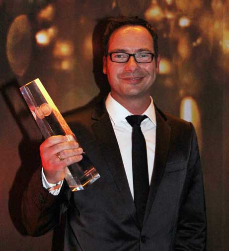 Preisträger Matthias Opdenhoevel beim Deutschen Fernsehpreis 2012